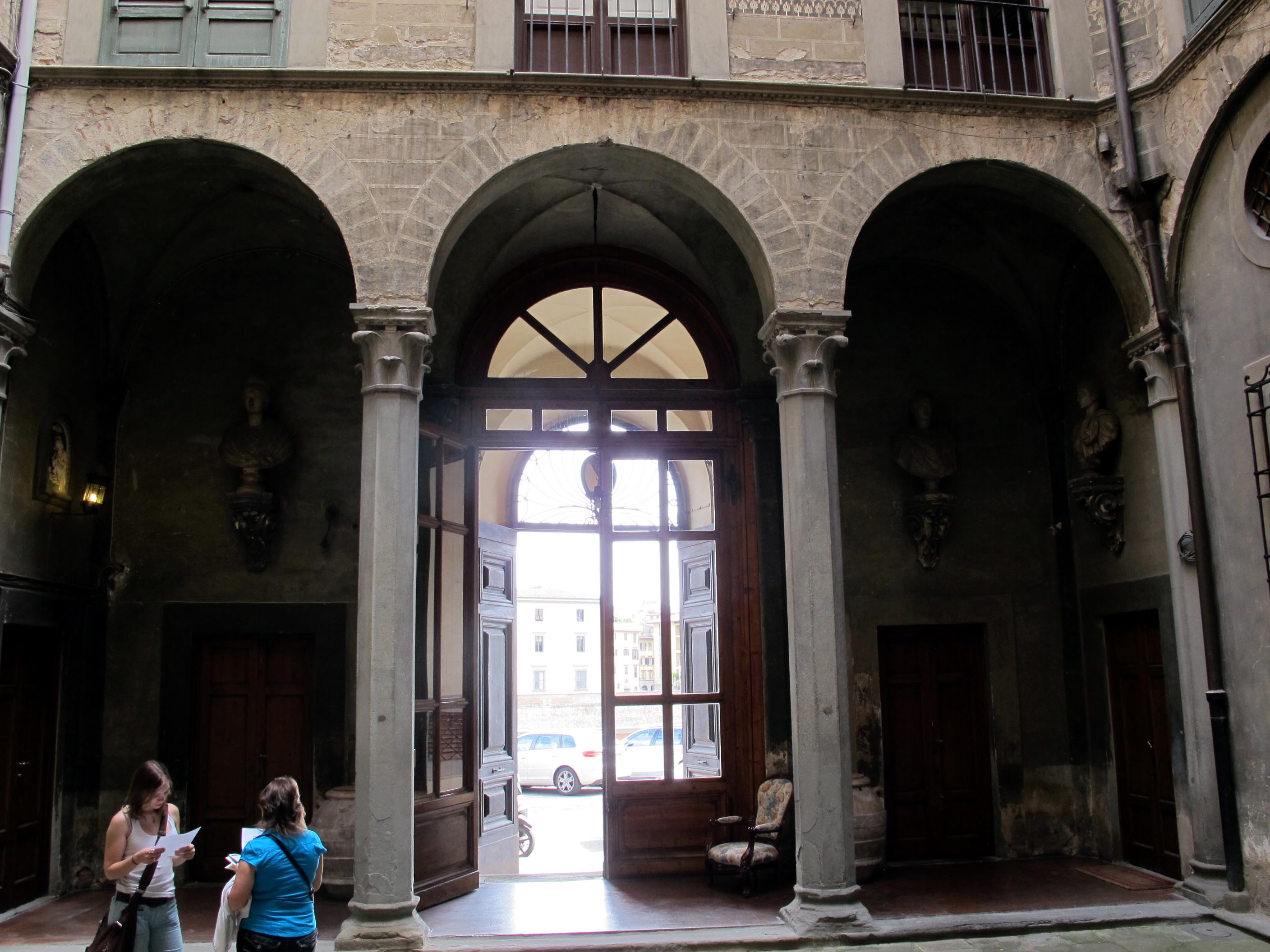 Palazzo capponi delle rovinate, cortile